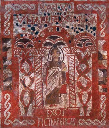 Mosaic de la Vil·la Romana dels Ametllers (Tossa de Mar, Girona)